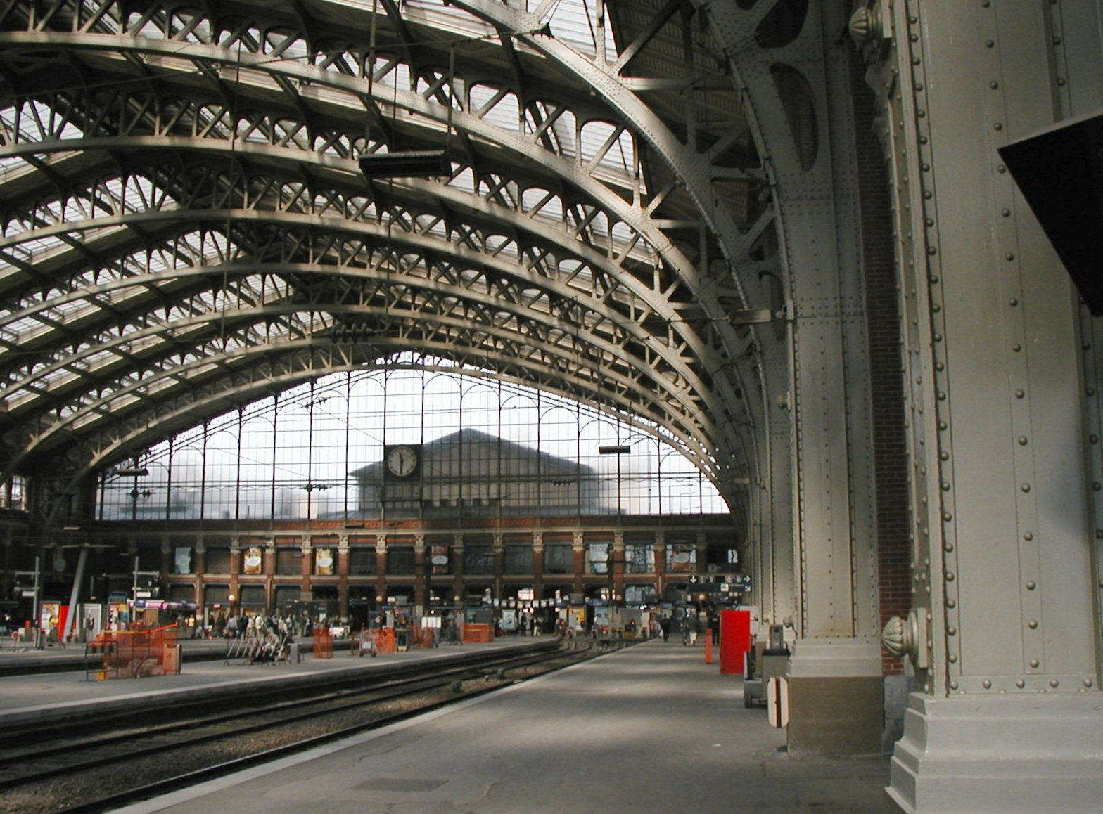 Gare Lille-Flandres, interieur de halle metallique